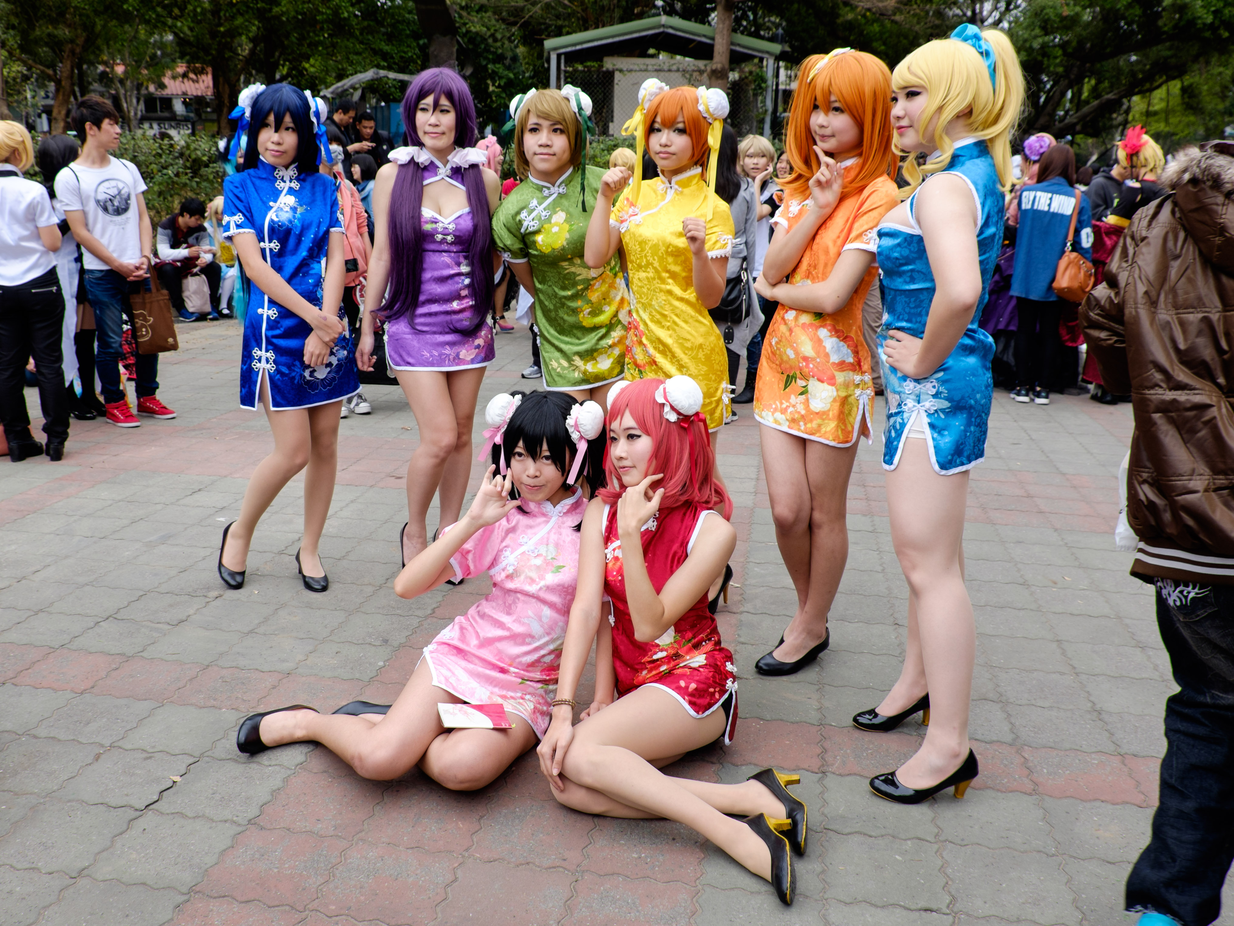 CWT39第一日下午，旗袍μ's成員8人Cosplayers合影。